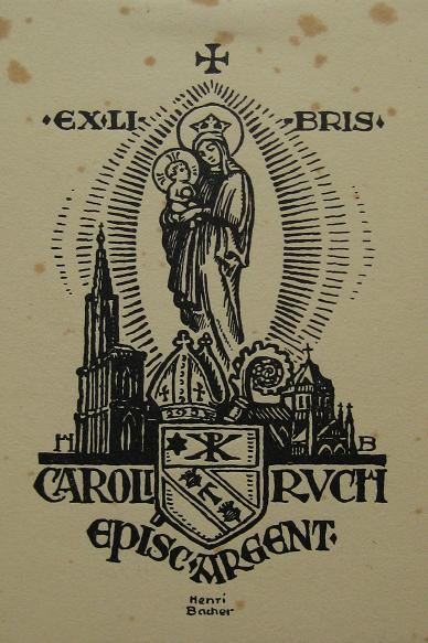 Ex-libris de Monseigneur Ruch par Henri Bacher